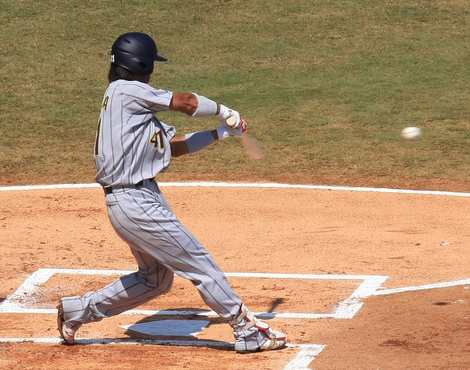 Atsunori Inaba